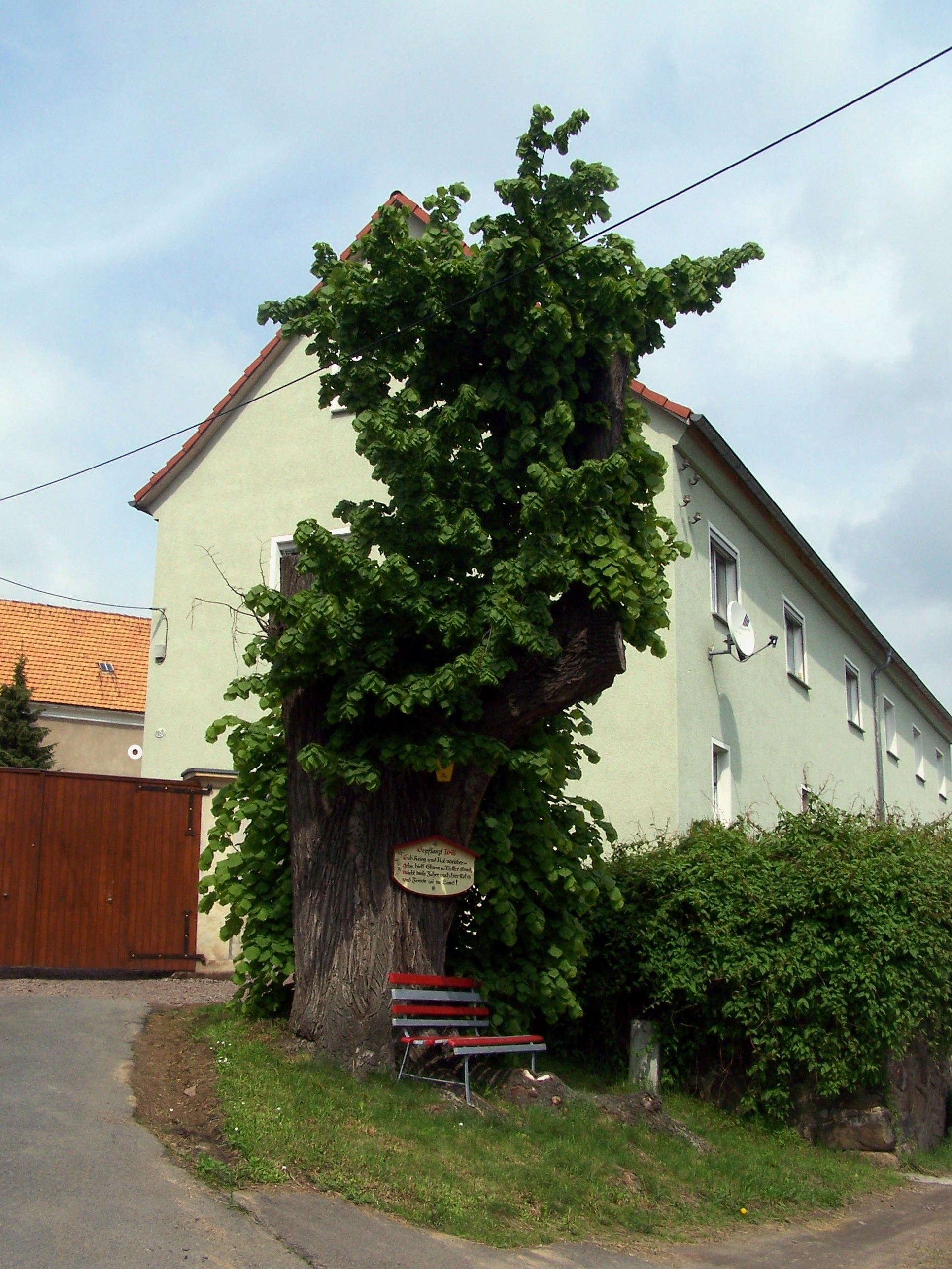 Friedenslinde in Kleinschönberg, Klipphausen, Landkreis Meißen; Inschrift der Tafel: Gepflanzt 1648Sah Krieg und Not vorüber-gehn, hielt Sturm und Wetter stand,möcht viele Jahre noch hier stehnund Friede sei im Land!